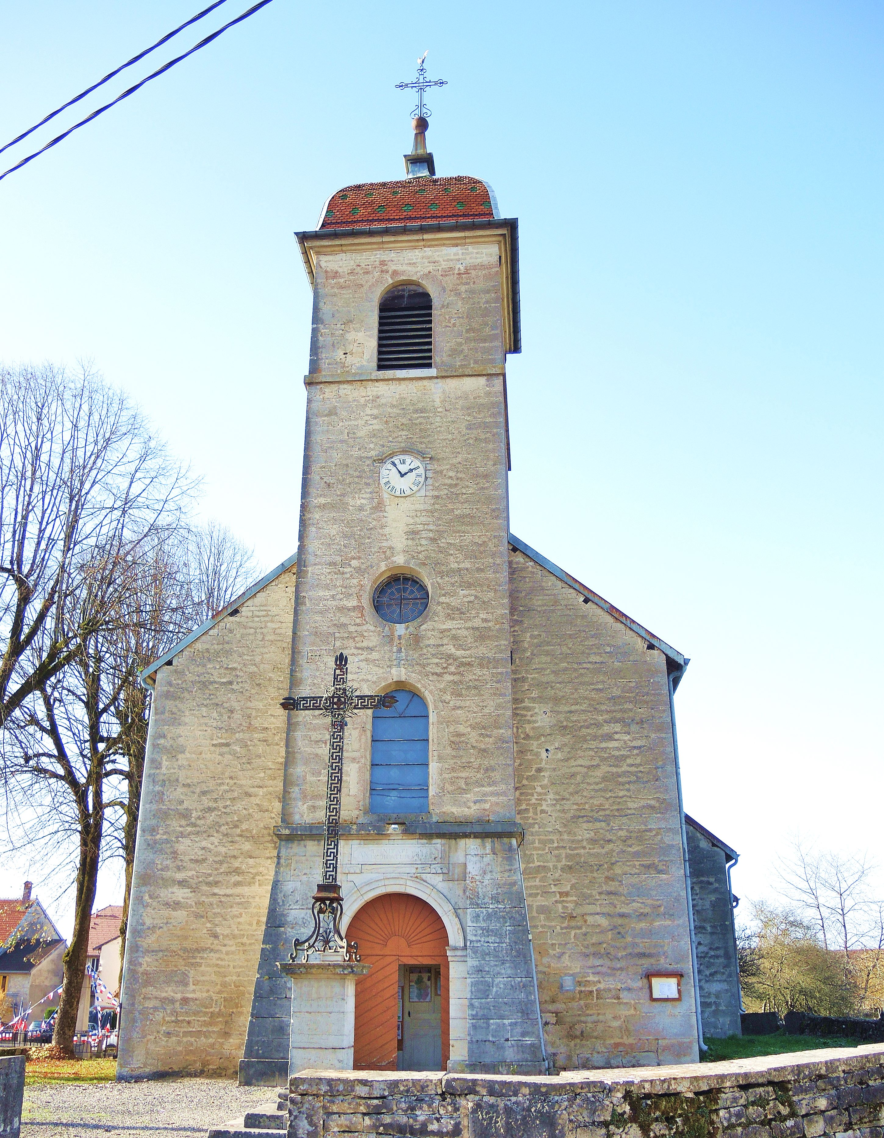 Elise de La Marre. Département du Jura. France.